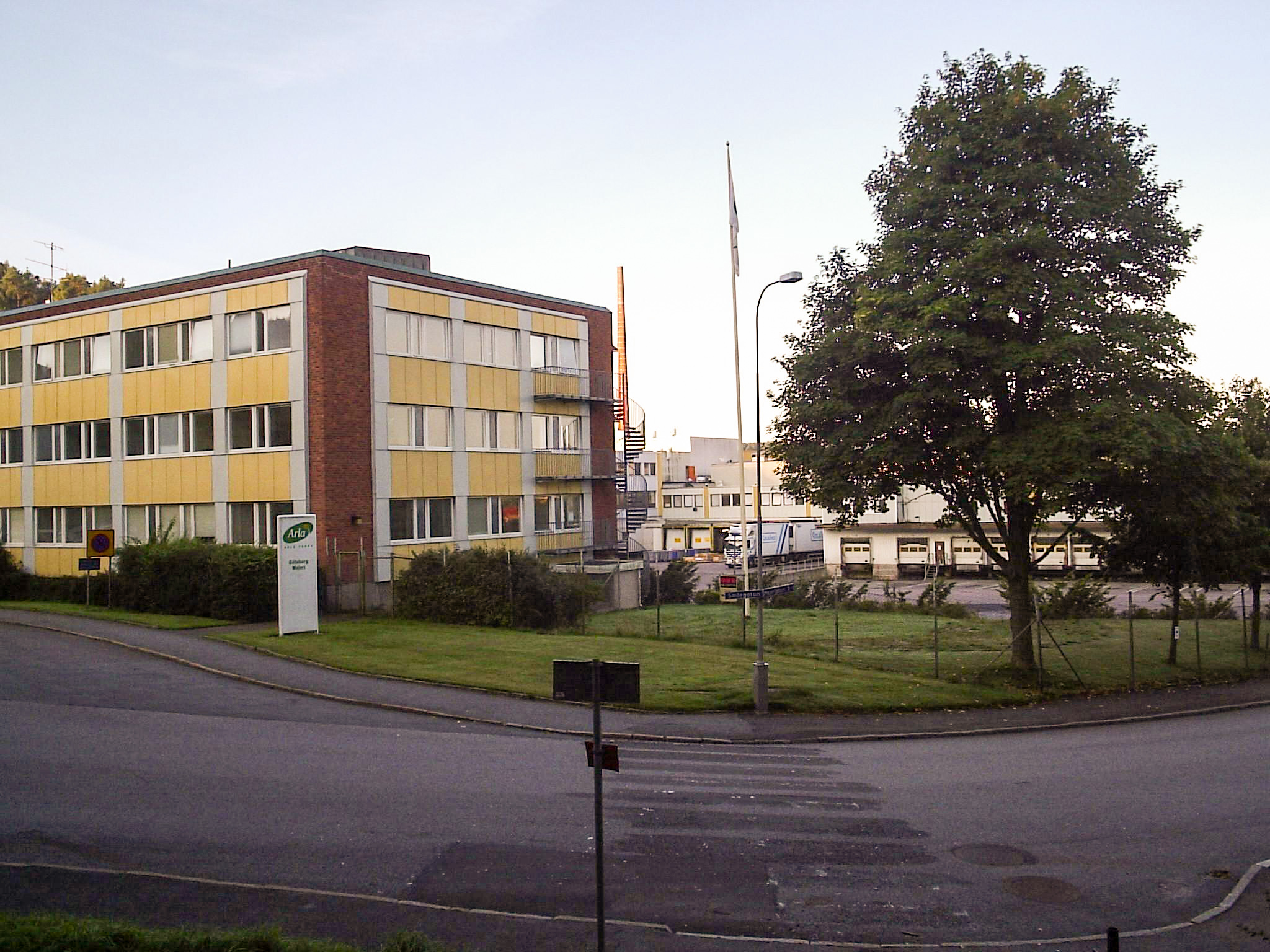 Arlas mejeribyggnader i Kallebäck, Göteborg, den 4 september 2005. Bilden är fotograferad av Harri Blomberg.